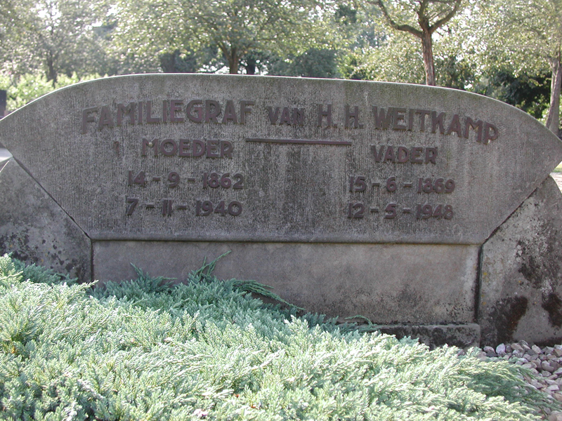 Grafsteen van het familiegraf van H.H. Weitkamp, burgermeester van Ambt Hardenberg, te Heemse (Overijssel)